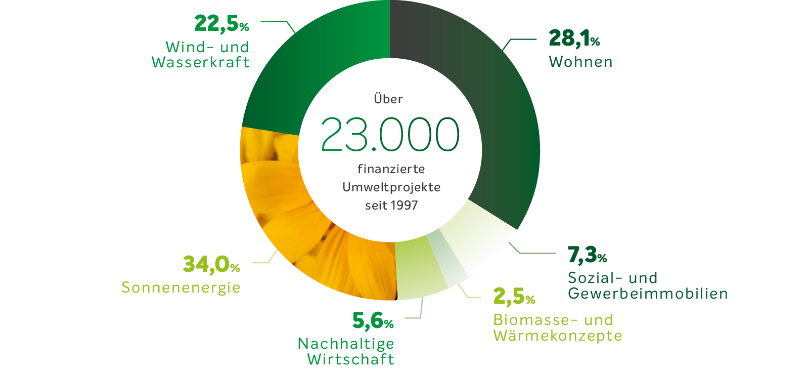 Struktur des Kreditgeschäfts für das Geschäftsjahr 2019